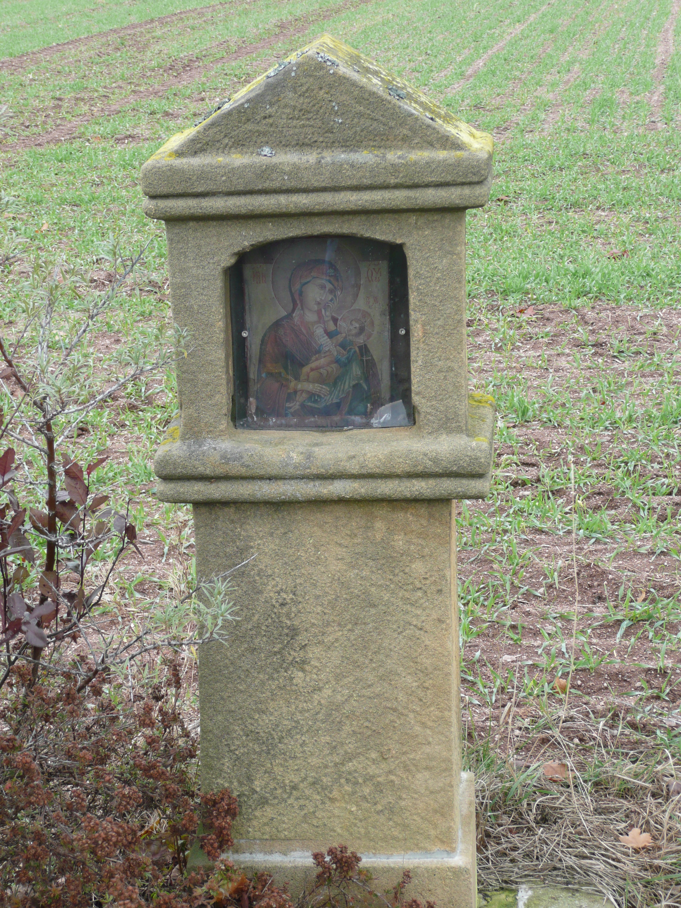 Geführt in der Liste der Baudenkmäler in Bayern unter Akten-Nr. D-3-71-127-59, Gemarkung Massenricht